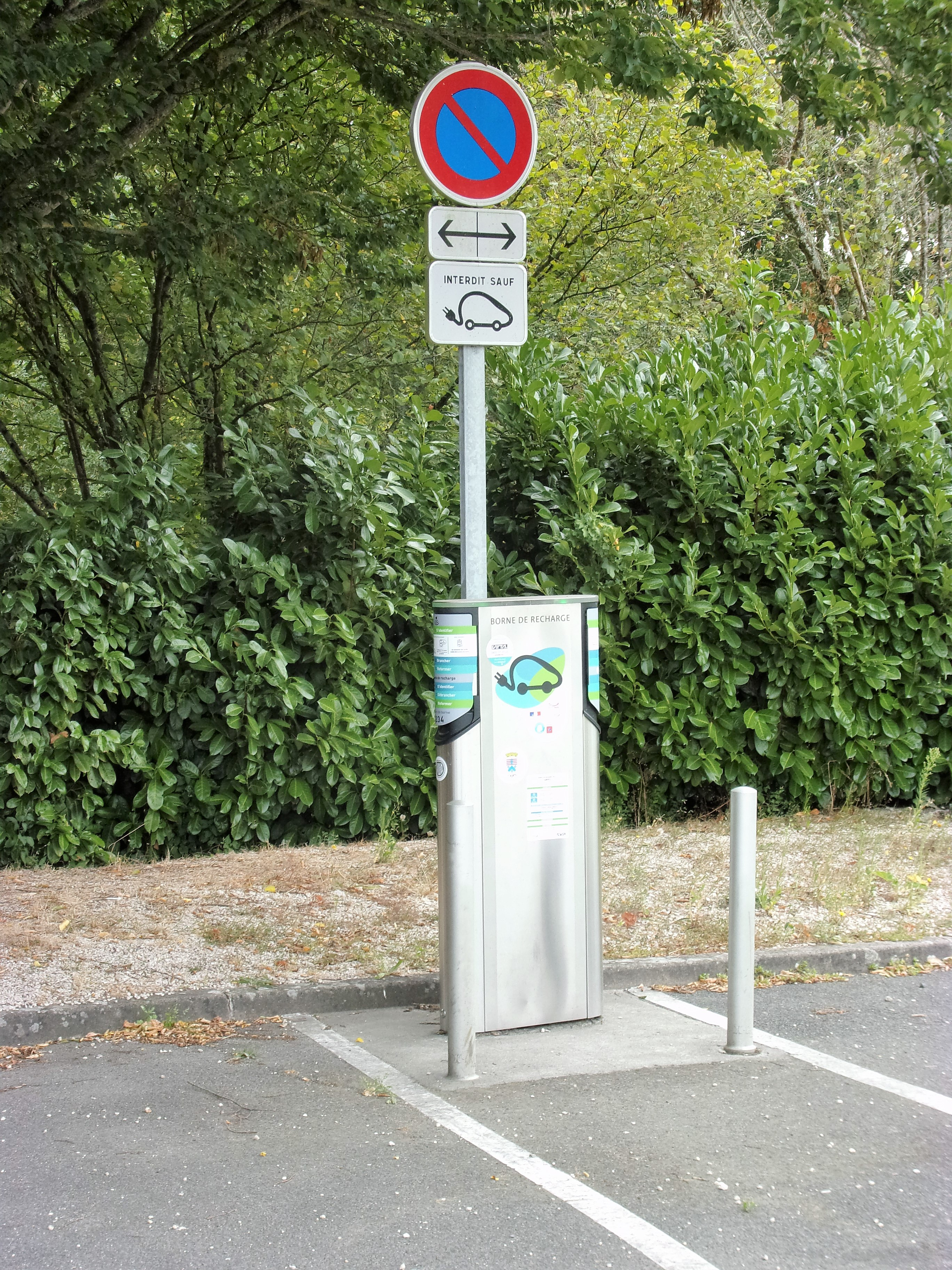 Borne de rechargement de véhicules électriques